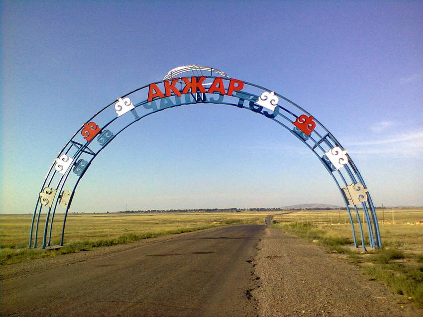 Въезд в Акжар